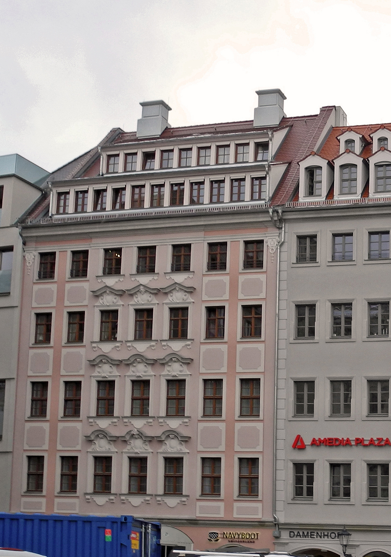 Das "Beutlersche Haus" in Dresden, Jüdenhof 7 und 8 (ehem. Neumarkt 16), zerstört 1945, wieder aufgebaut 2018.